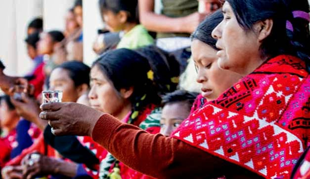 Mujeres indigenas tomando Pox